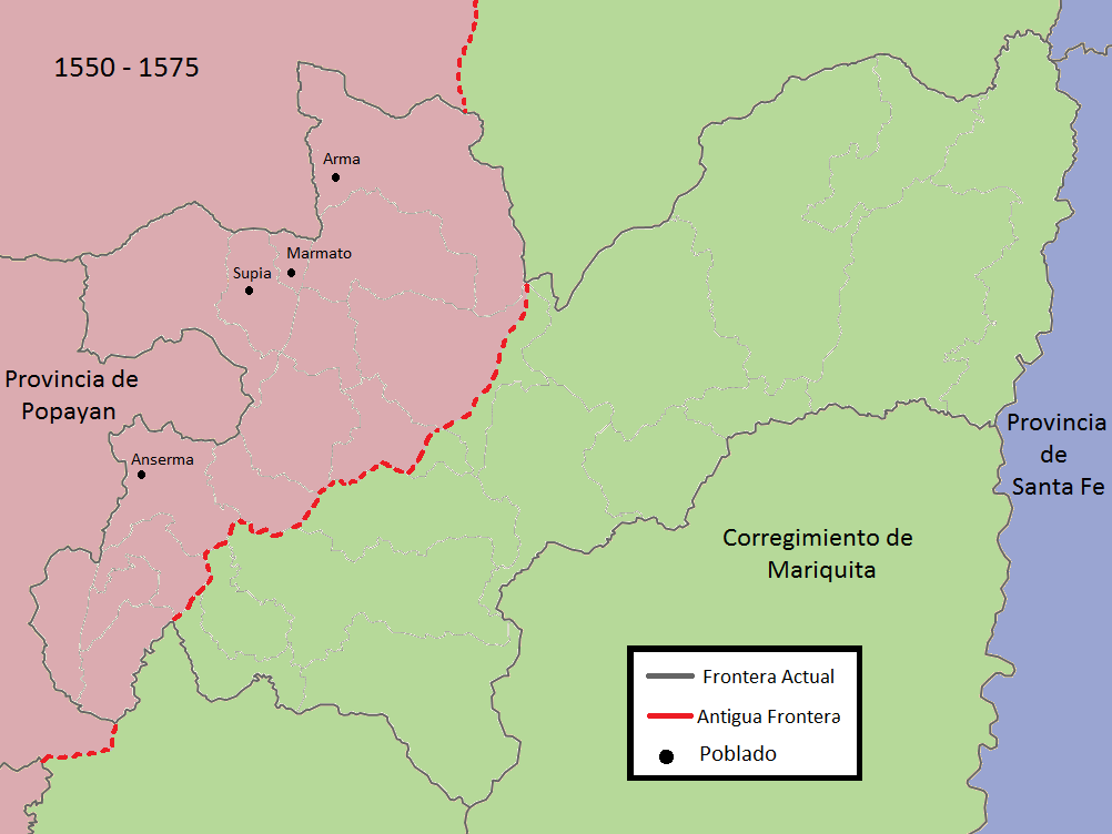 mapa de caldas